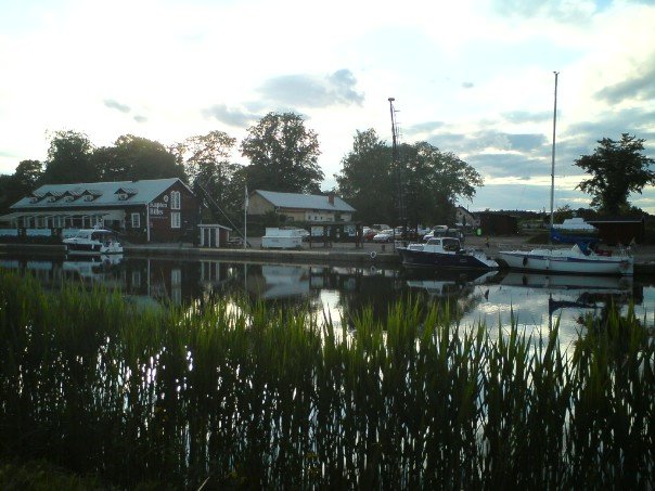 Gästhamnen i Norsholm juni 2009